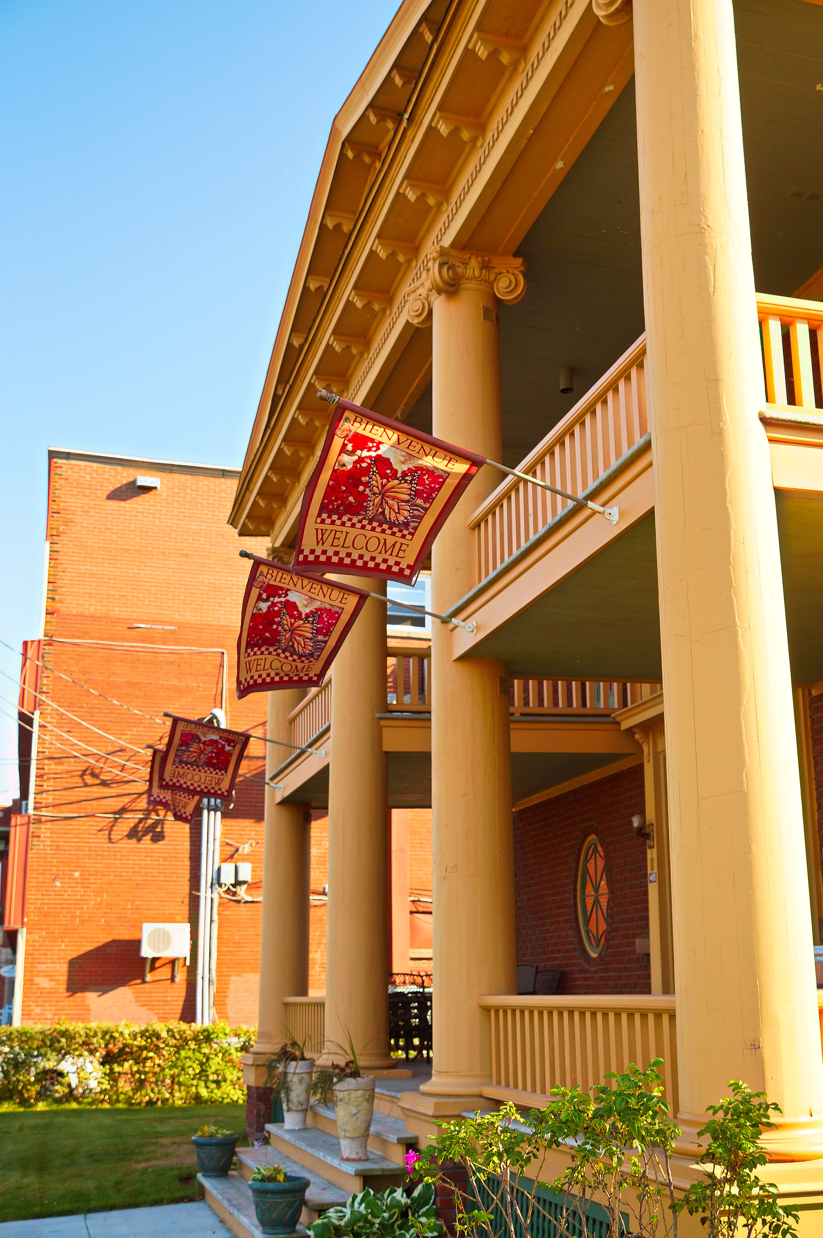 Maison Joseph-Wilfrid-Faucher